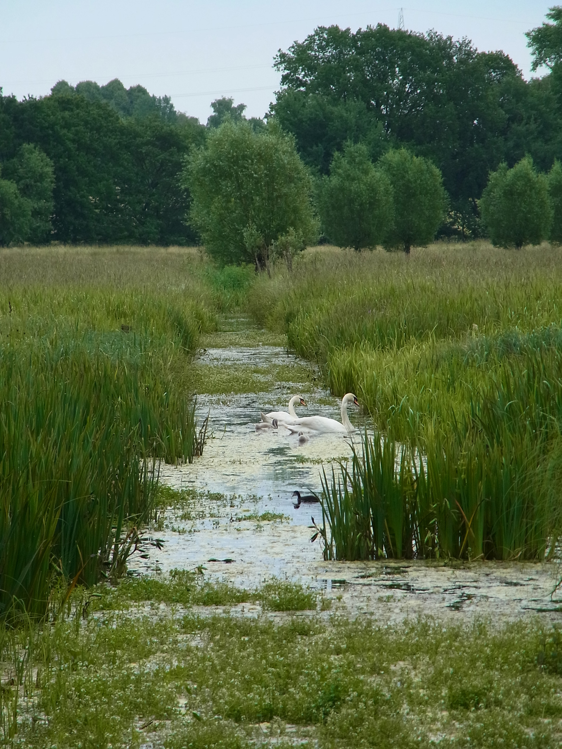 Höckerschwäne und Blässhühner auf dem Schapener Graben im Naturschutzgebiet Riddagshausen